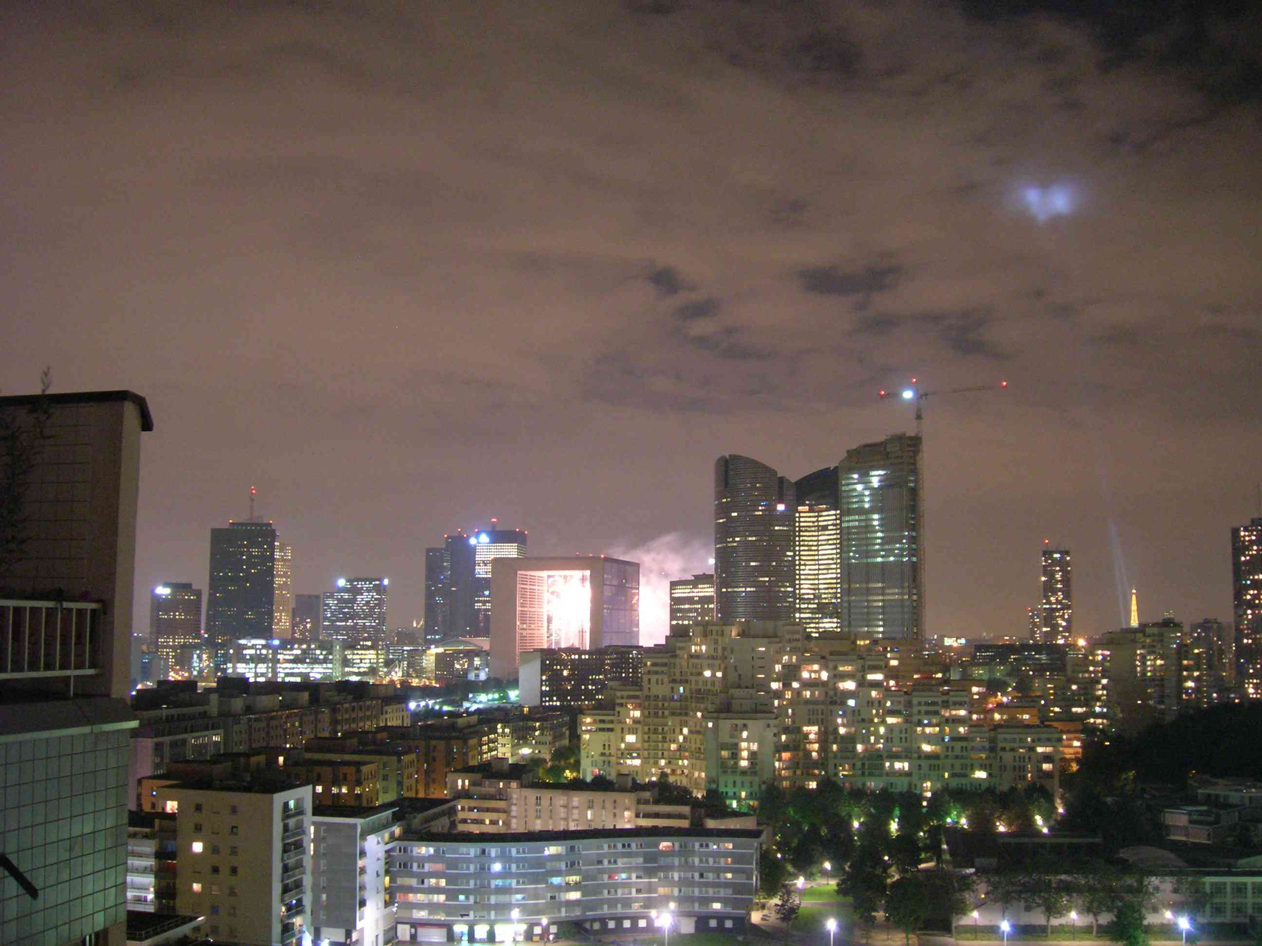 La Défense vue de Nanterre (de la Résidence "Liberté")06-09-2007.jpg œuvre personnelle 06-09-2007 Andalior Premières fusées du feu d'artifice lancé à l'occasion de la Coupe du Monde de Rugby 06 septembre 2007. Prise de vue depuis les derniers étages de la résidence "Liberté" en bordure du parc André Malraux à Nanterre. APN Nikon 5 Mega (réduite en basse résolution pour le Web : 212 Ko)